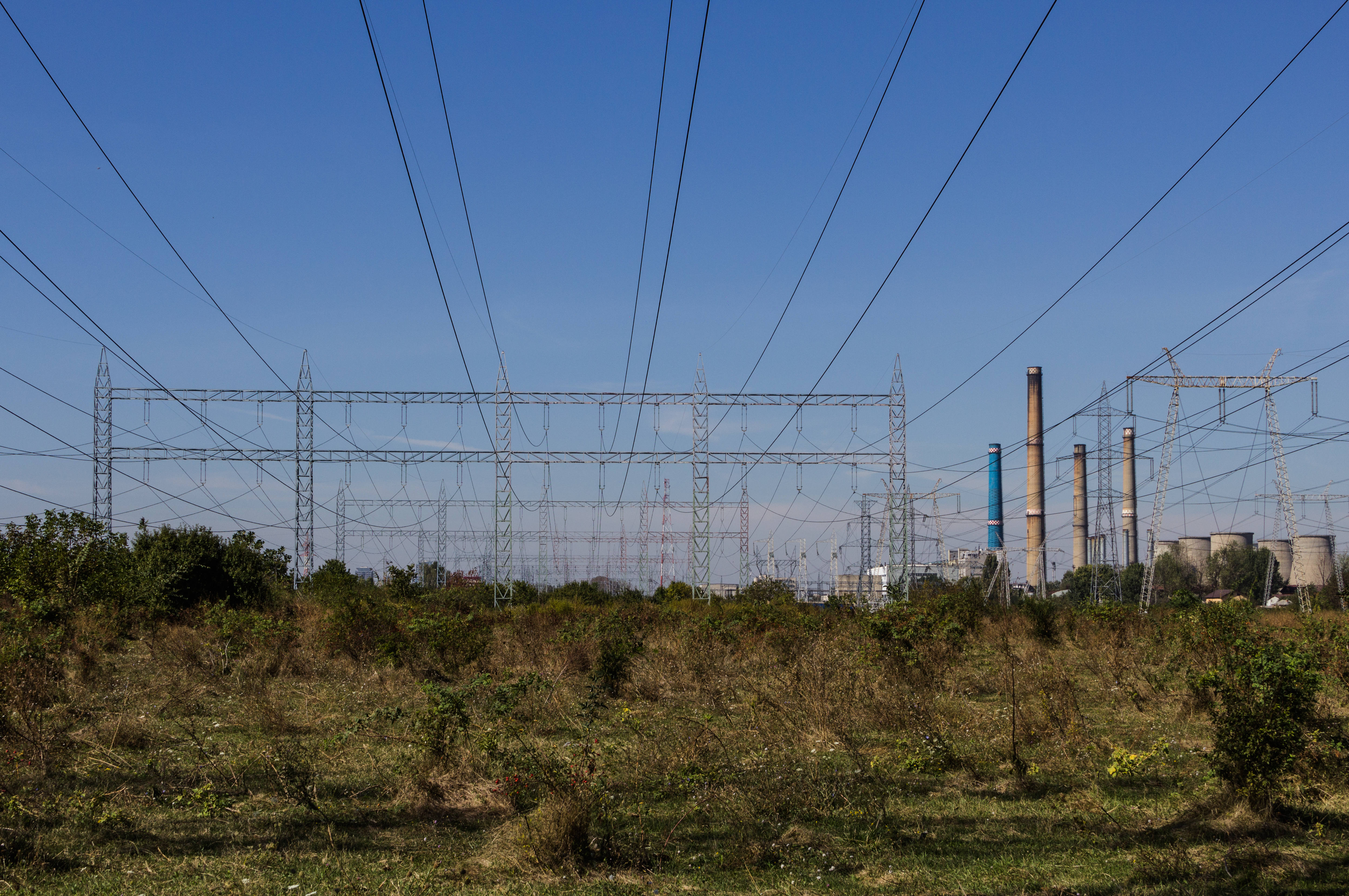 Așezare între Malu Mierii și C.E.T. Dudești 01